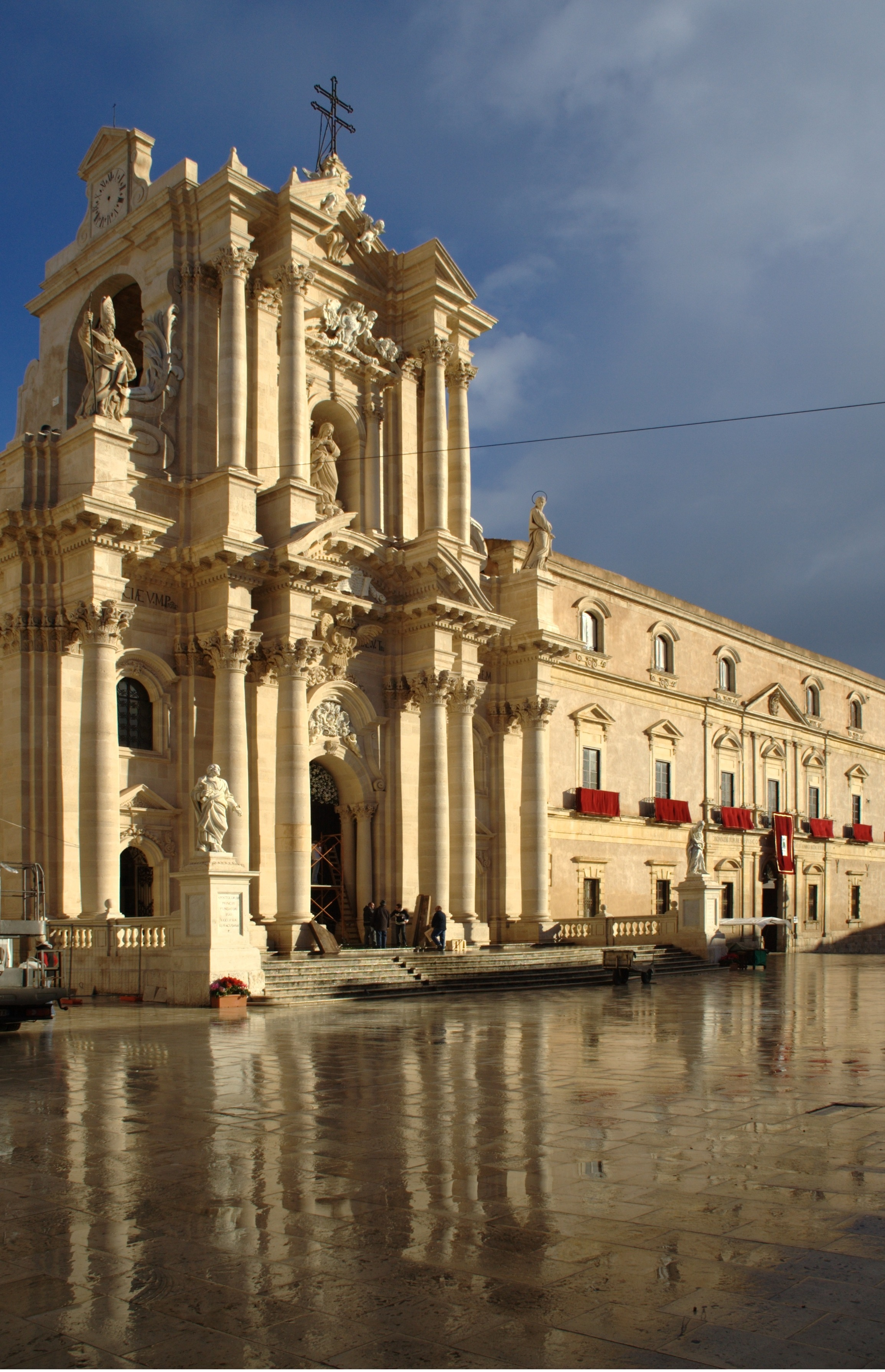 Piazza Duomo dopo temporale